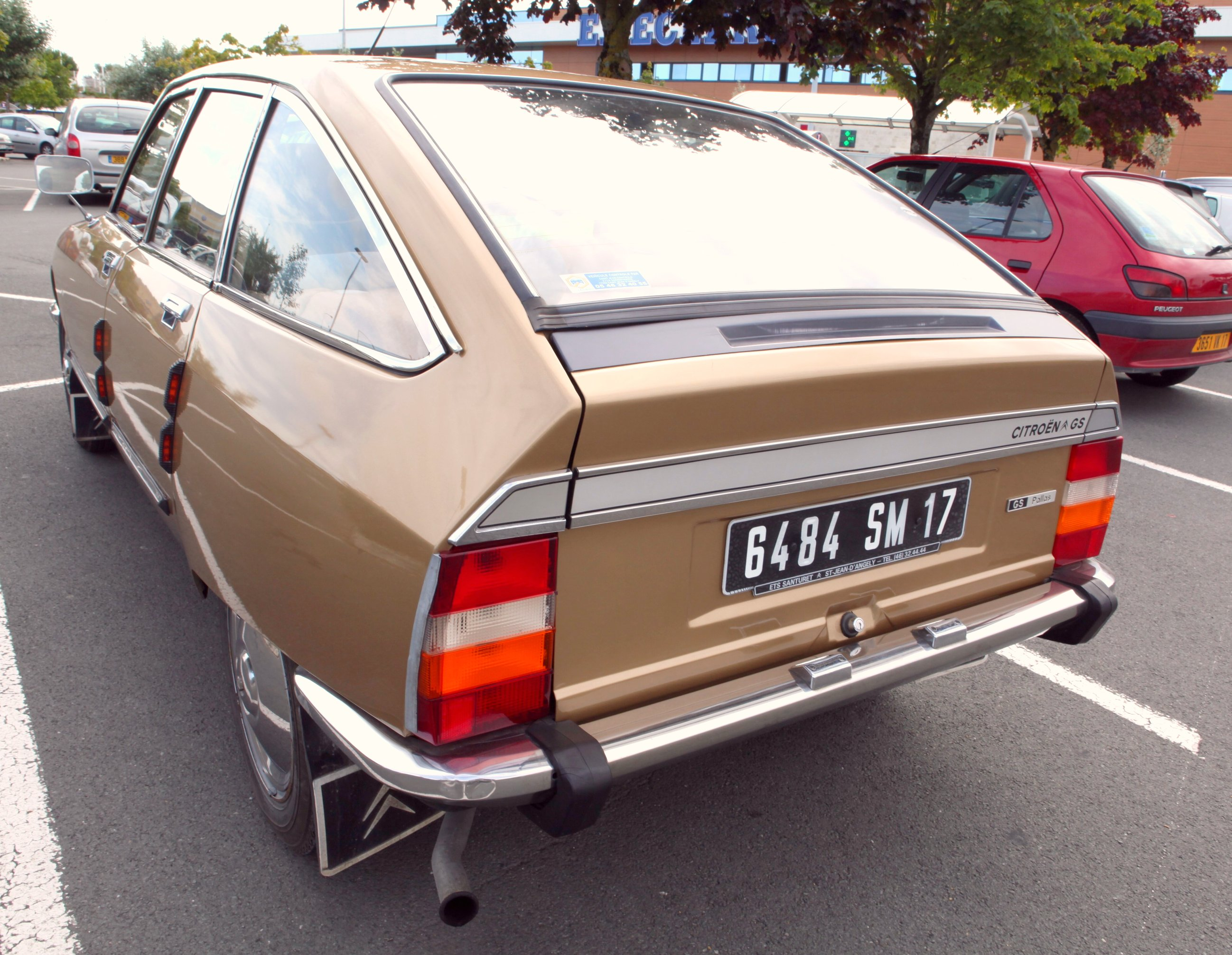 Citroen GS Pallas